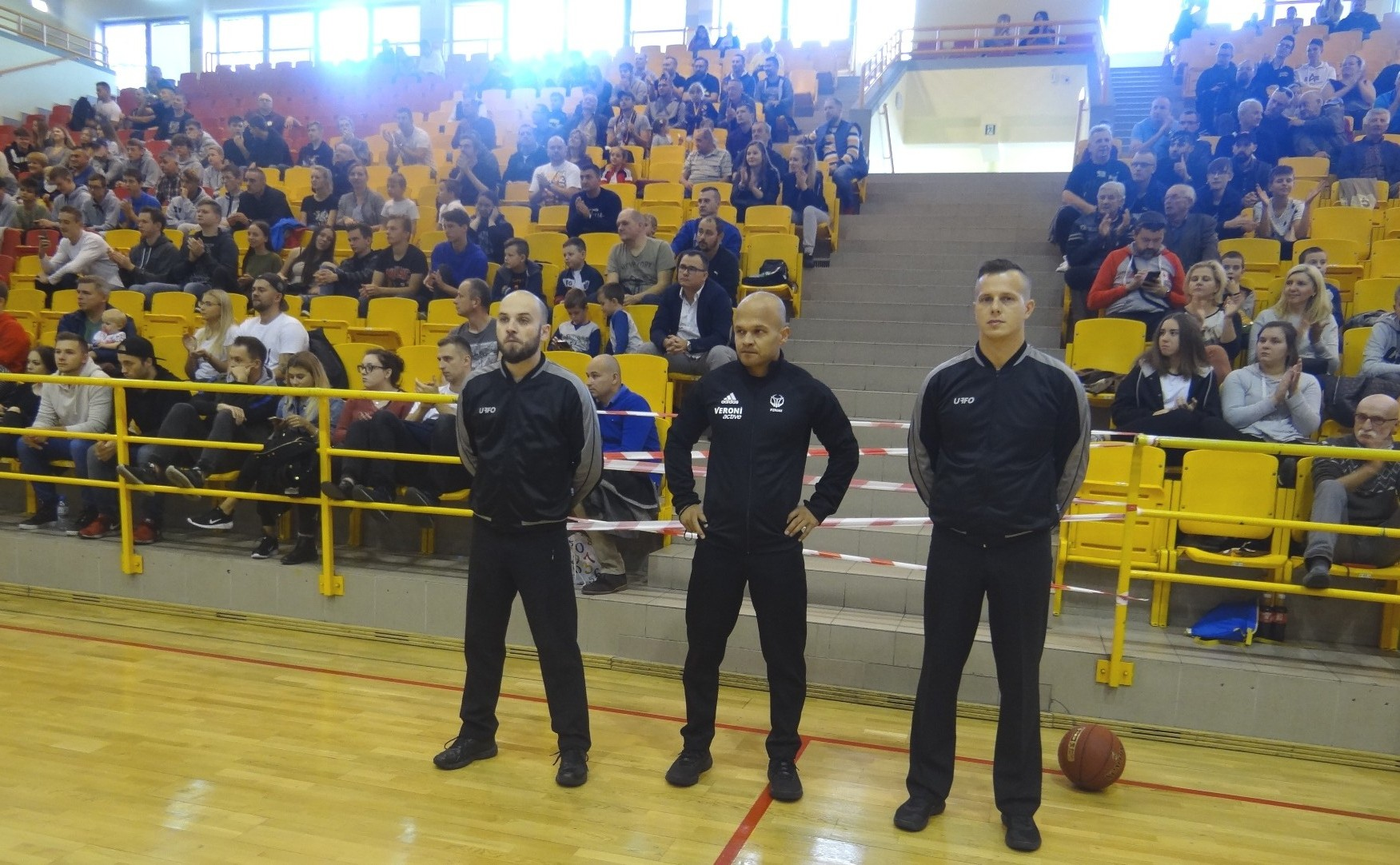 Sędziowie meczu AZS Koszalin - Spójnia Stargard (29.09.2018)